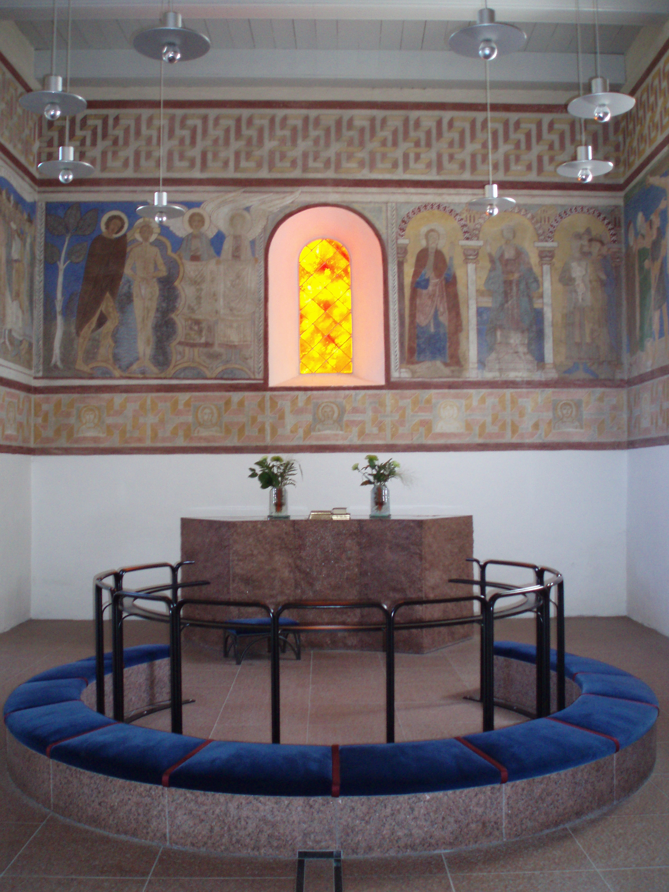 Jelling Kirke in Jelling, Denmark. Photographer: User:Brams